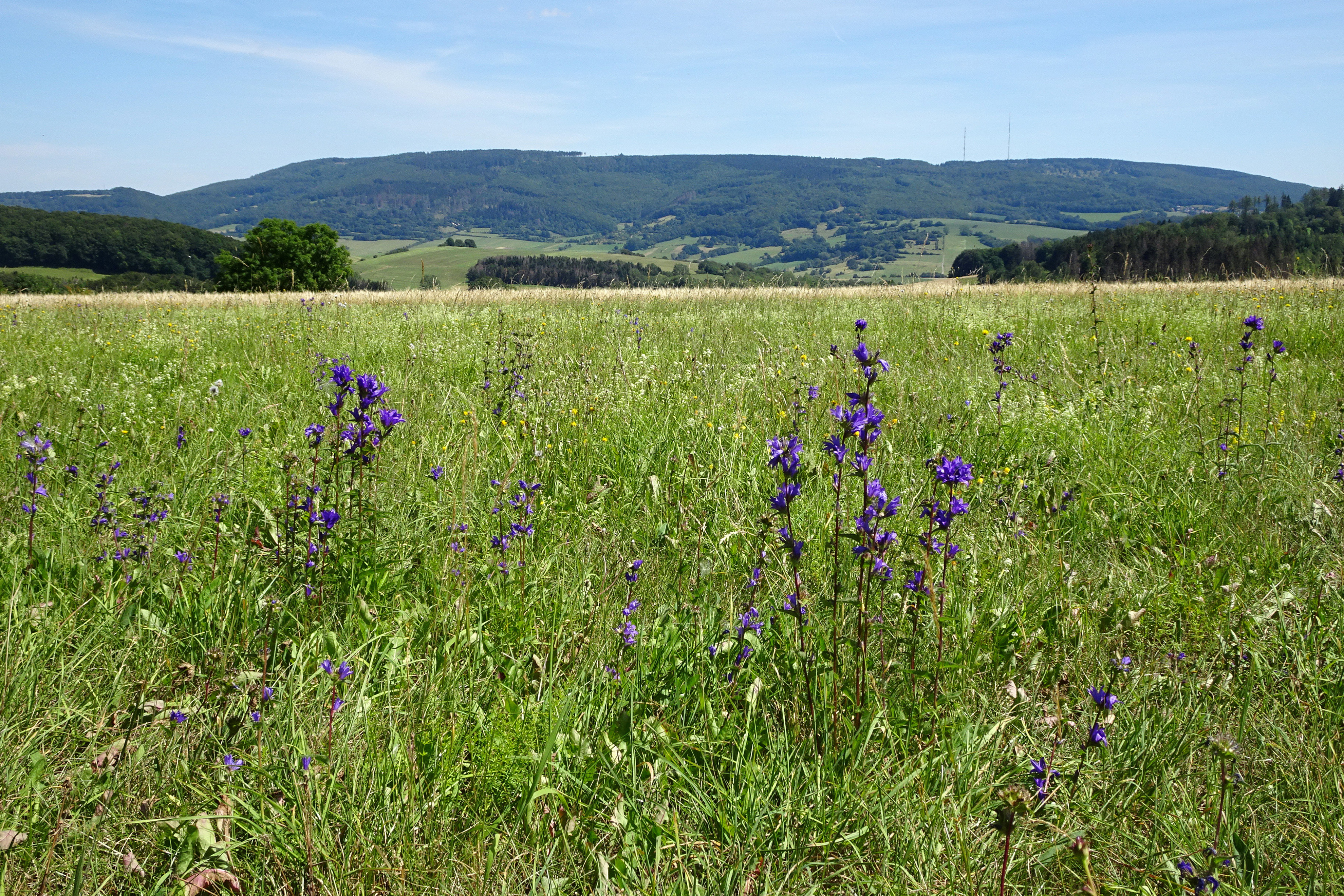 Der Rösberg erhebt sich mit einer Höhe von 539,4 m aus der Mittelgebirgslandschaft des Kaufunger Waldes, südöstlich von Rommerode, einem Ortsteil der Stadt Großalmerode im nordhessischen Werra-Meißner-Kreis. Er wird geprägt von Kalkmagerrasen, Wirtschaftsgrünland, Äckern und Wäldern, die sich kleinräumig miteinander abwechseln und ein vielgestaltiges Landschaftsbild ergeben. Wegen dem Vorkommen von besonders schutzwürdigen Tier- und Pflanzenarten auf seinen Grünlandflächen, wurde er als ein Flora-Fauna-Habitat-Gebiet zu einem Bestandteil des europaweiten Schutzgebietssystems Natura 2000, das eine länderübergreifende Vernetzung von bedrohten Lebensräumen zum Ziel hat. Auf den Halbtrockenrasen, die durch die Bewirtschaftung des Menschen entstanden sind, finden sich mehr als sechzig verschiedene Pflanzenarten, von denen viele als selten und gefährdet angesehen werden.